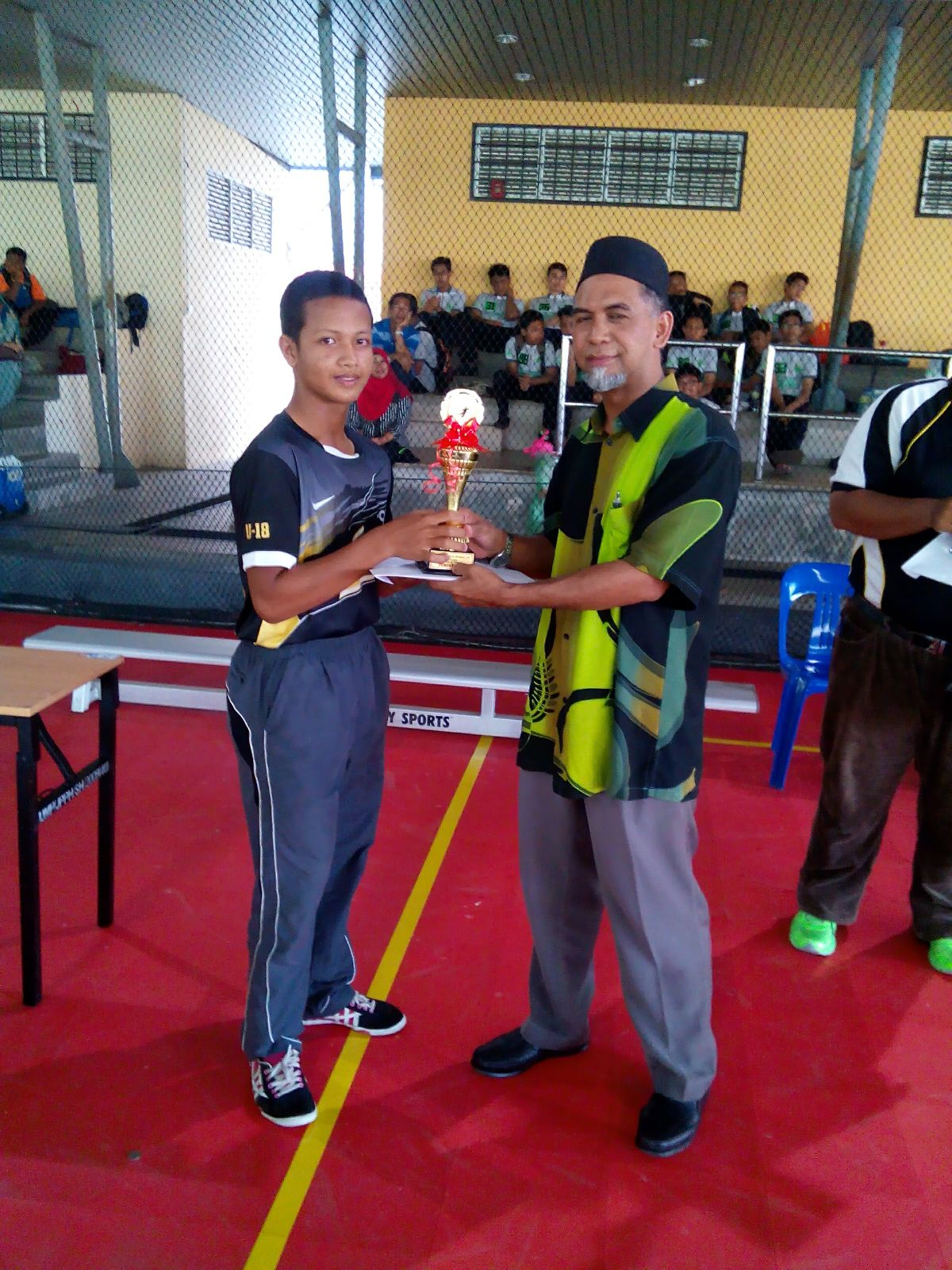 Pengelola Terbaik untuk Kejohanan Bola Baling MSSD Kuantan di UMP Gambang